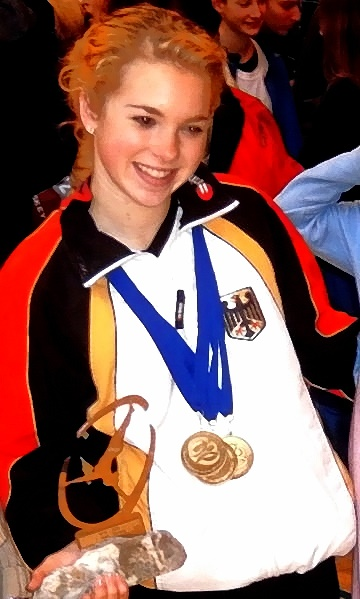 Rhönrad-Weltmeisterin Laura Stullich bei der WM 2005 in Bütgenbach (Belgien).